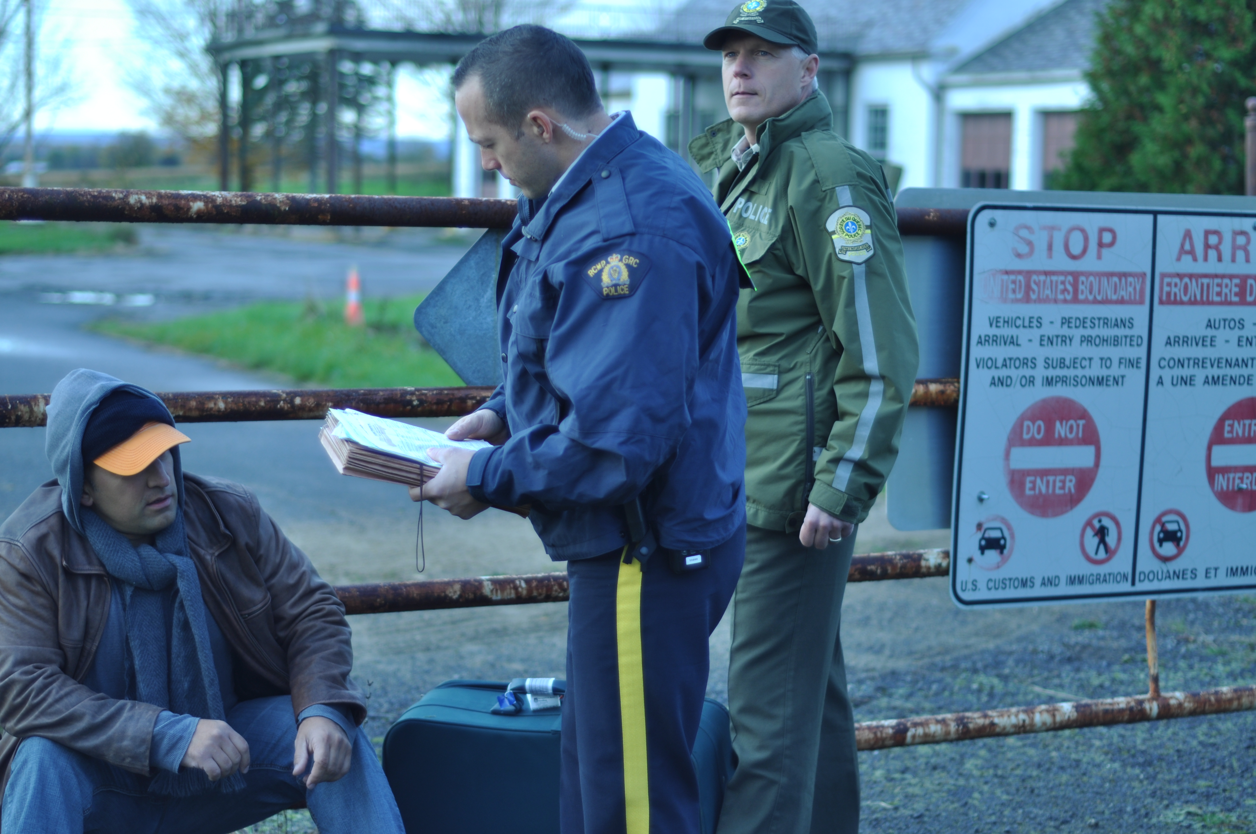 immgration